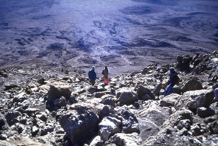 Kilimanjaro National Park - Tanzania